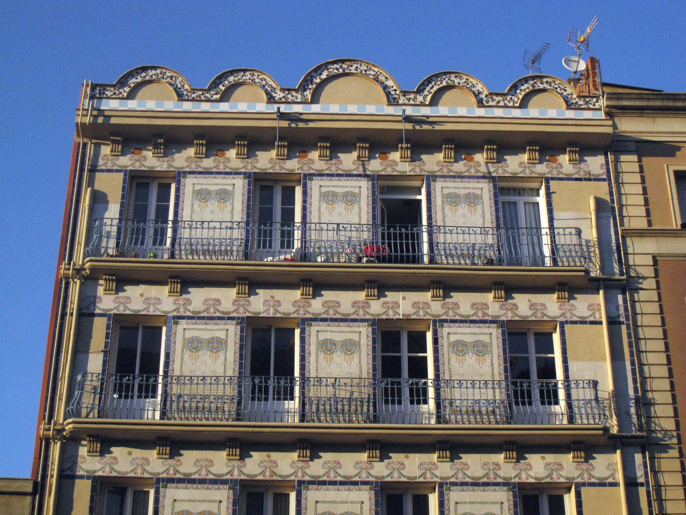 L'anomenada Casa del Bunyolero, al Portal de Sant Roc núm. 54 (Terrassa). Detall de la part alta de la façana.